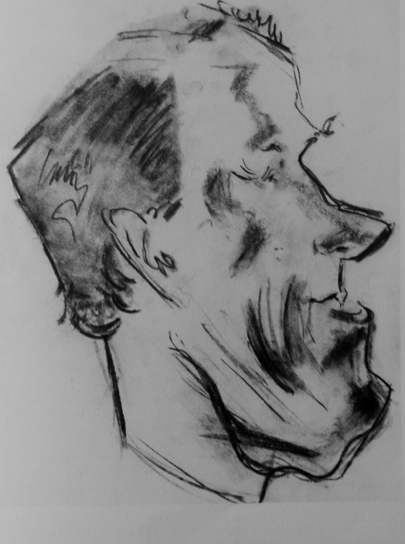 Ellis Wallin. Karikatyrteckning av konstnärsvänner utförd av konstnären John Jon-And, utgiven postumt efter hans död 1941 i boken Konstnärer Gebers Förlag.